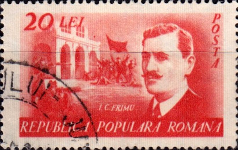 IC Frimu - design realizat de Dimitrie Știubei